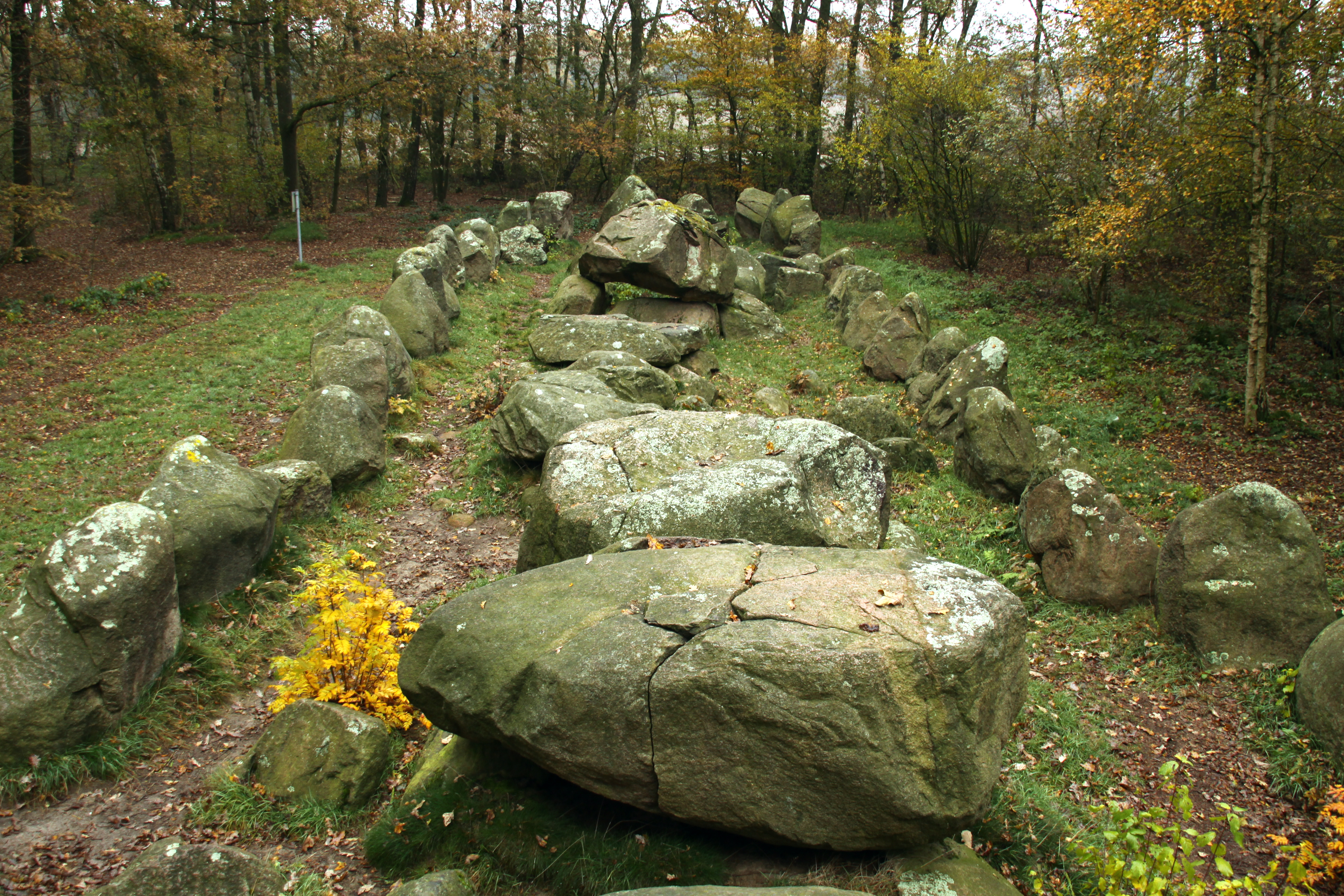 Großsteingrab bei Kleinenkneten